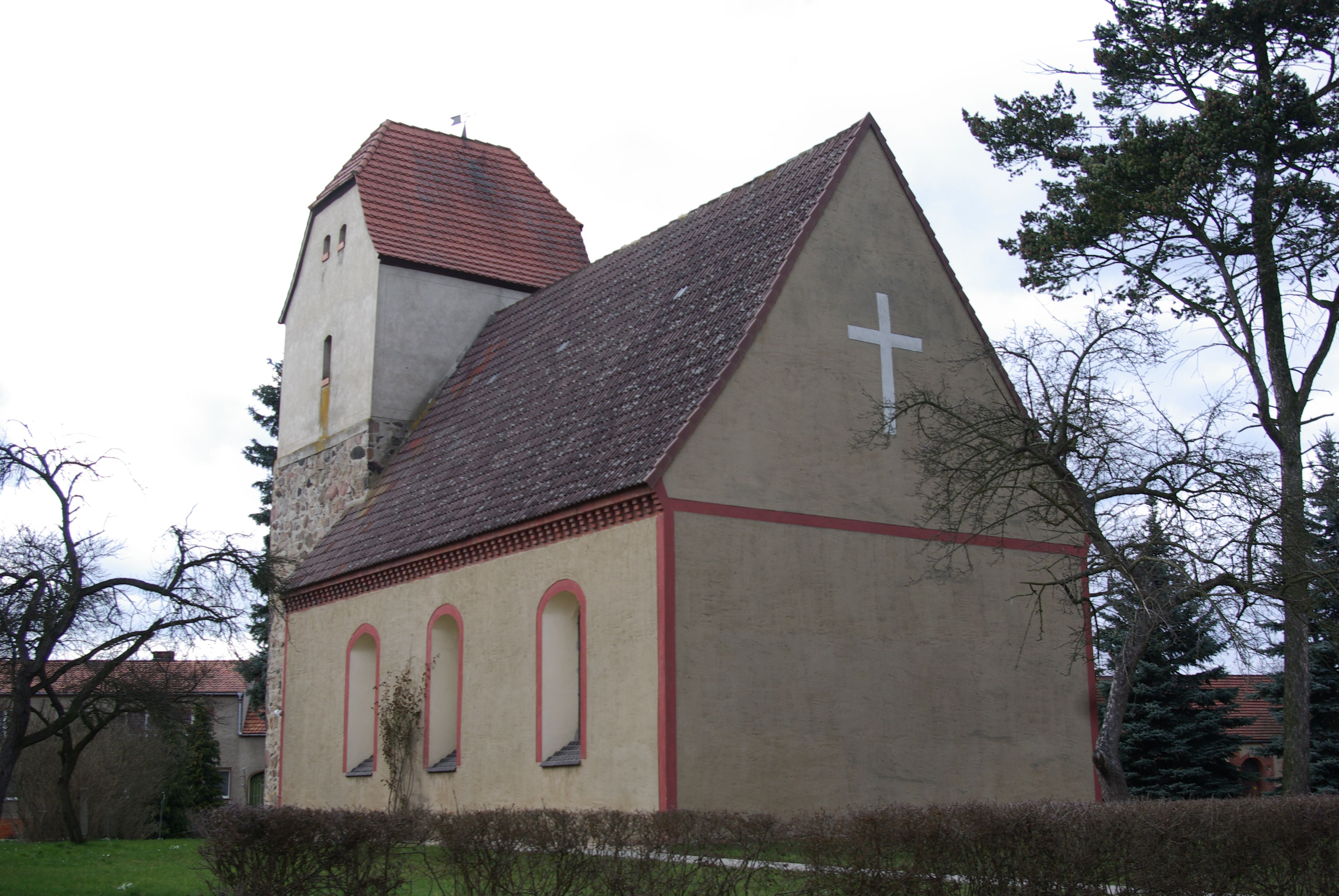 Dahmetal in Brandenburg. Die Kirche im Ortsteil Prenzdorf steht unter Denkmalschutz. Sie stammt aus dem 14./15. Jahrhundert.